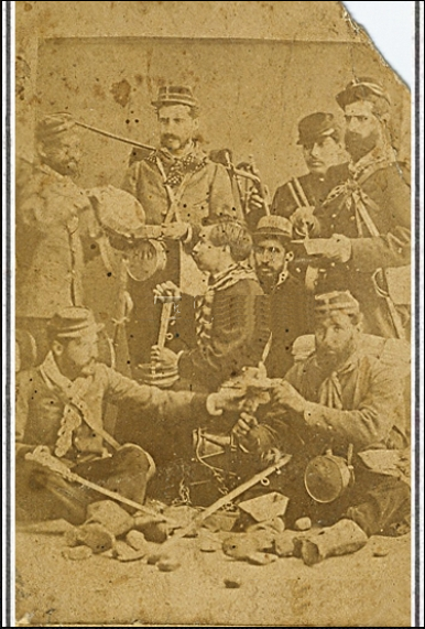 magen, zapadores chilenos, foto tomada posiblemente en 1880, propiedad de don Eduardo Molina, descendiente del Teniente Coronel Alejandro Molina